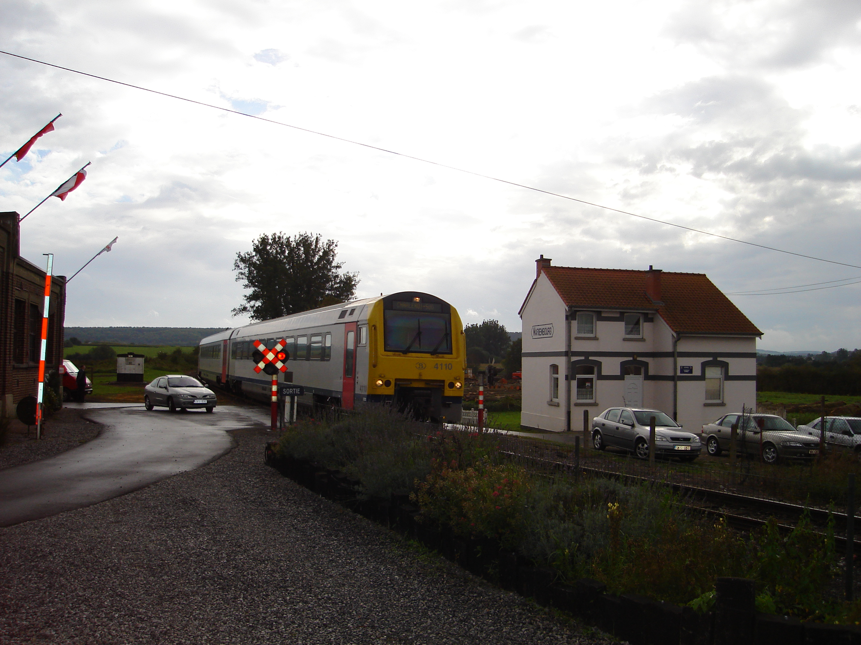 MARIEMBOURG